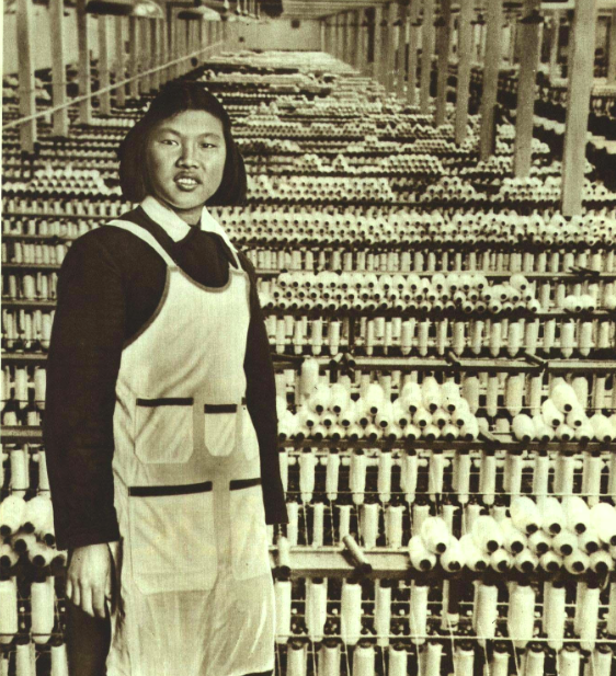 195111 郝建秀